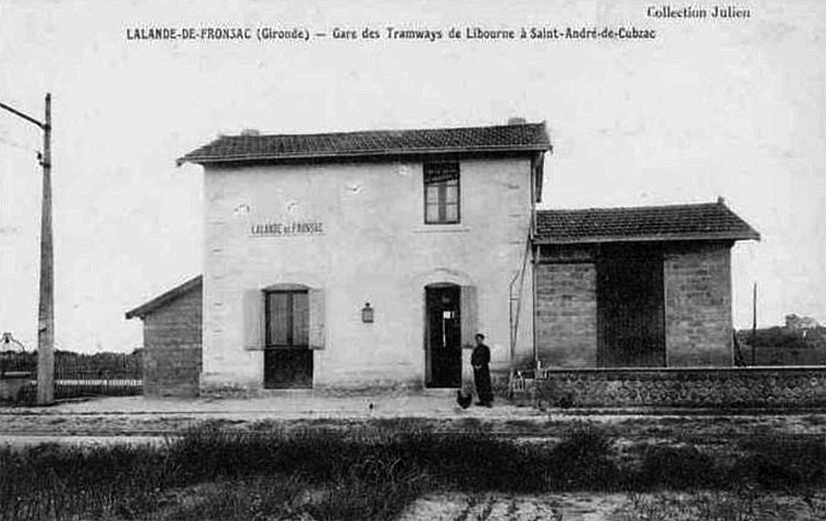 La gare de Lalande-de-Fronsac de la ligne Tramway de Saint-André-de-Cubzac à Libourne et à Puisseguin exploitée par les Tramways électriques du Libournais.